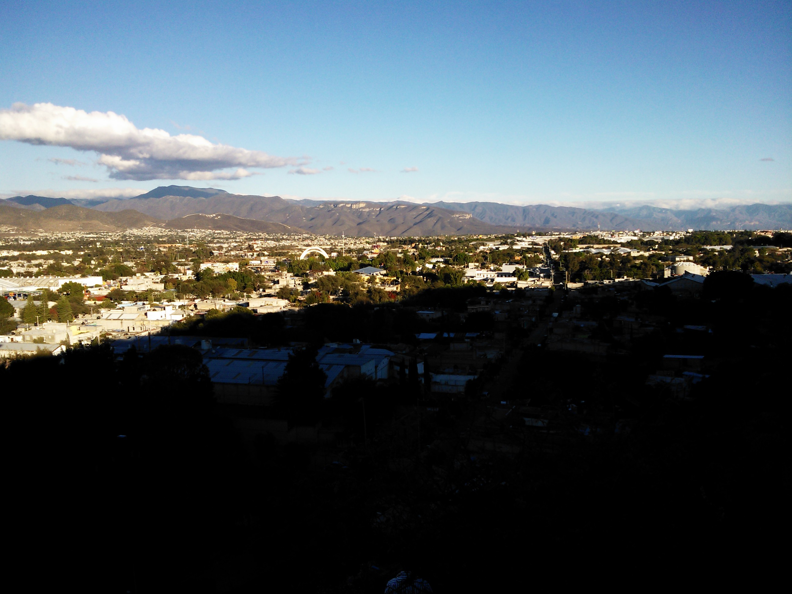 Ciudad de Tehuacan (Zona metropolitana).